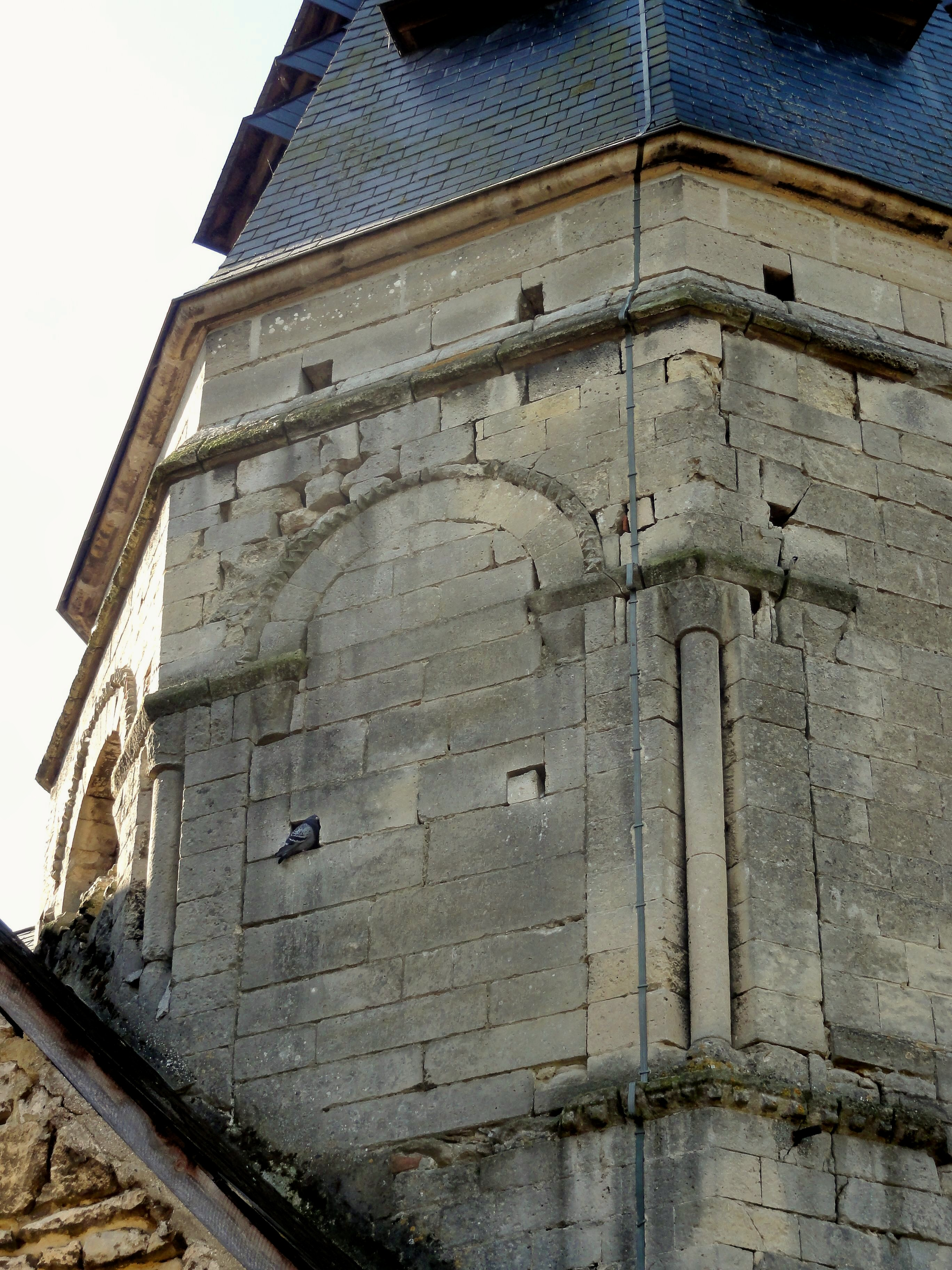 Clocher, face nord.